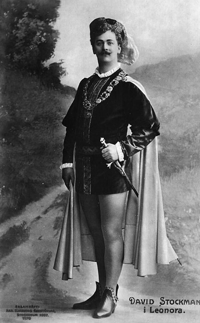 David Stockman i Leonora